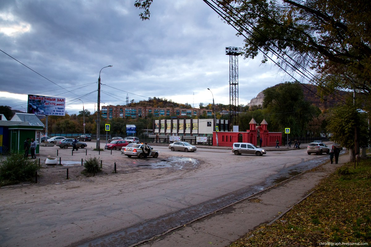 Центр посёлка Красная Глинка, Самара, Россия